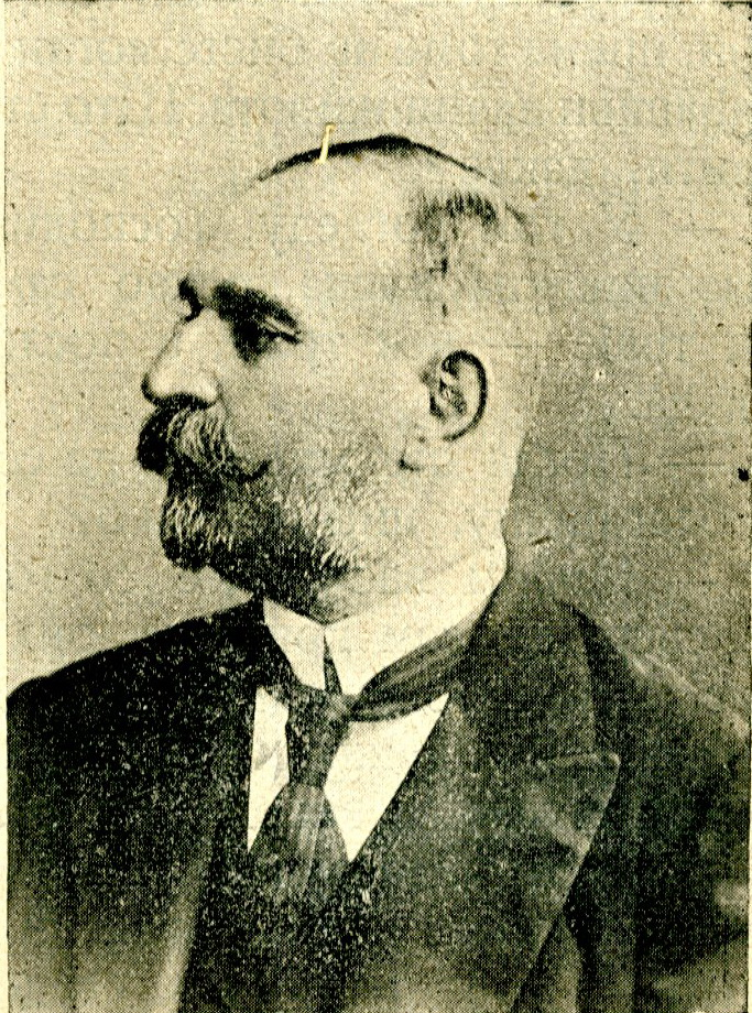 Đorđe Vajfert